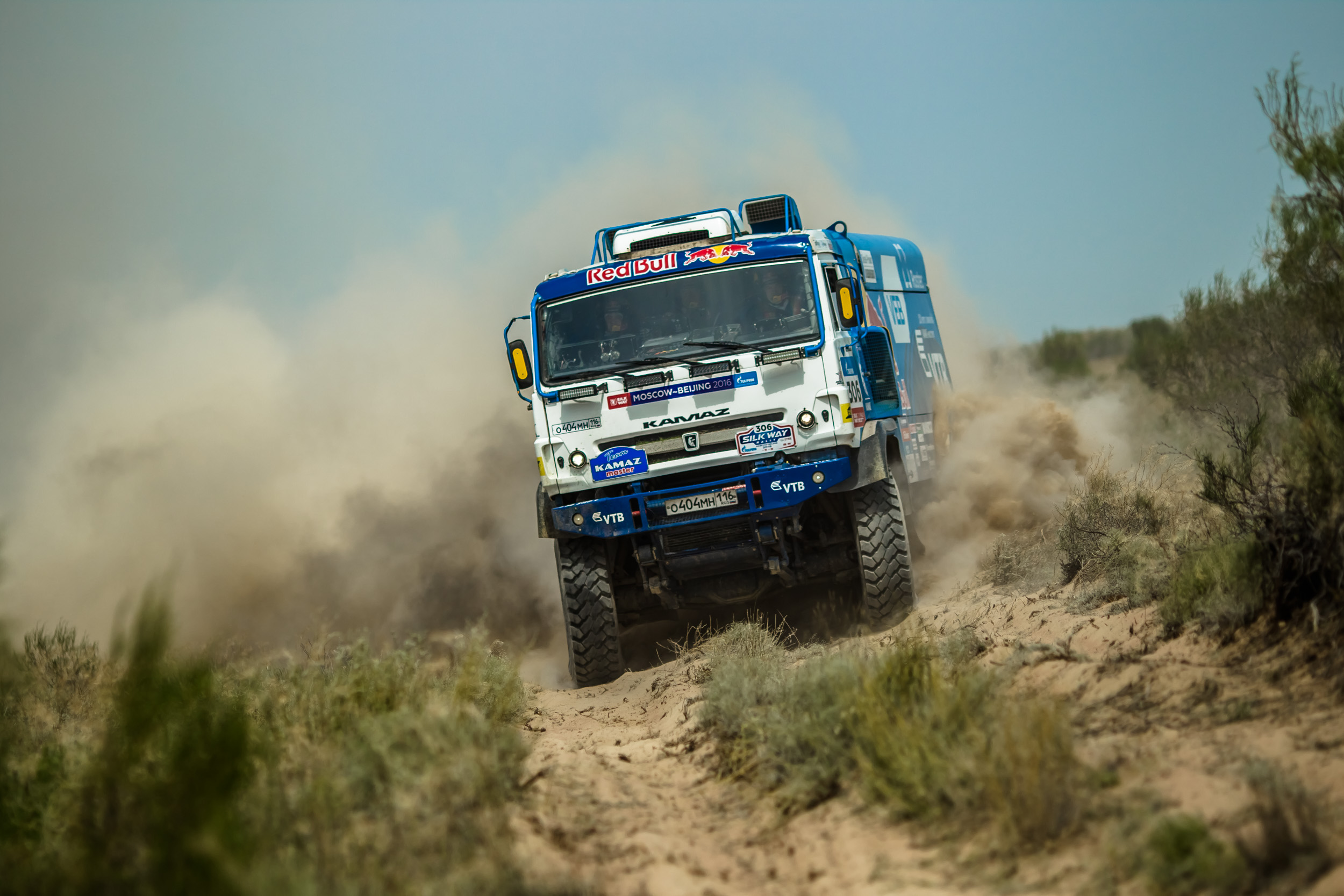 КАМАЗ-мастер на трассах в Казахстане - ралли "Шелковый путь-2016"